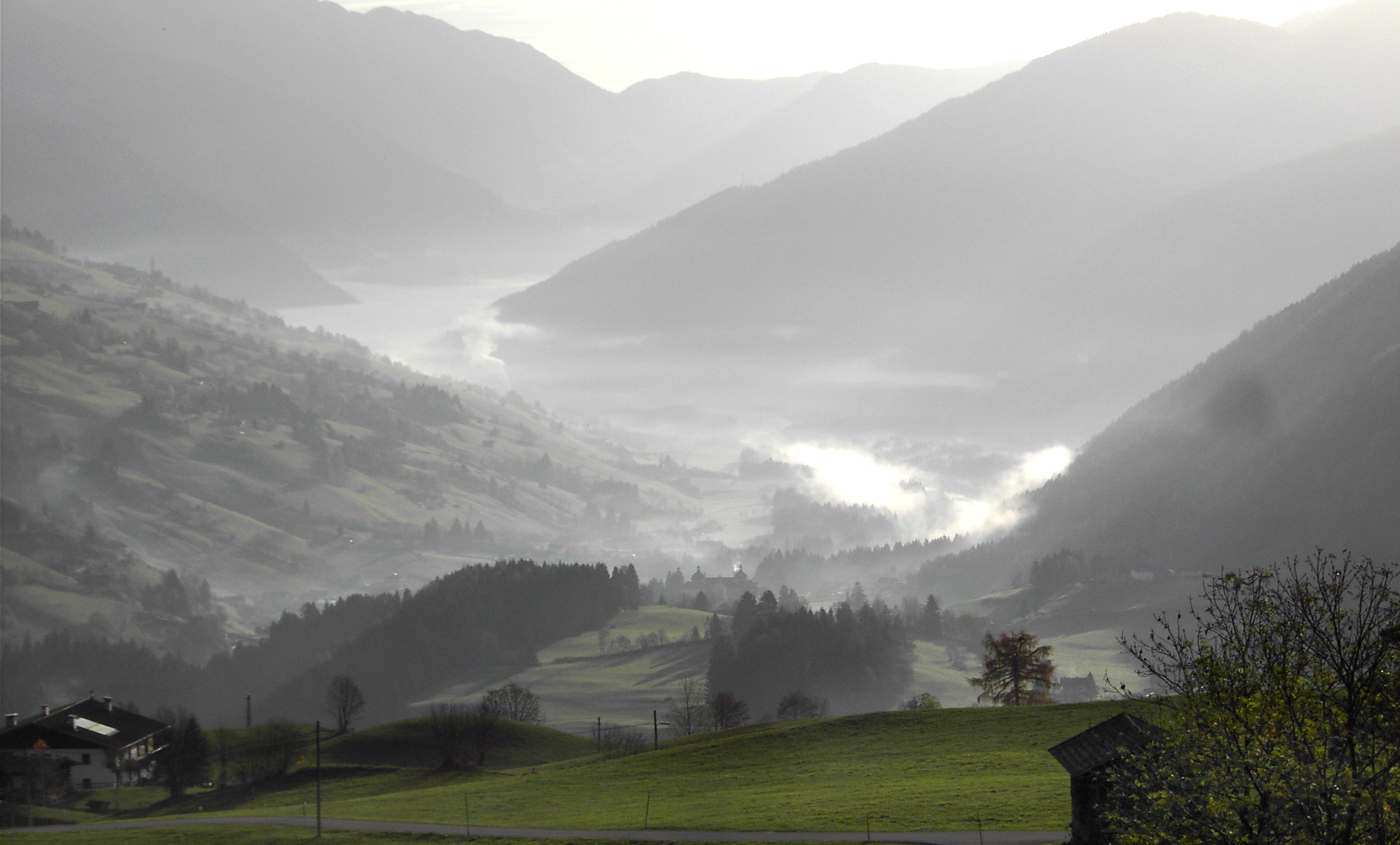 Morgennebel im Ridnauntal (Südtirol)